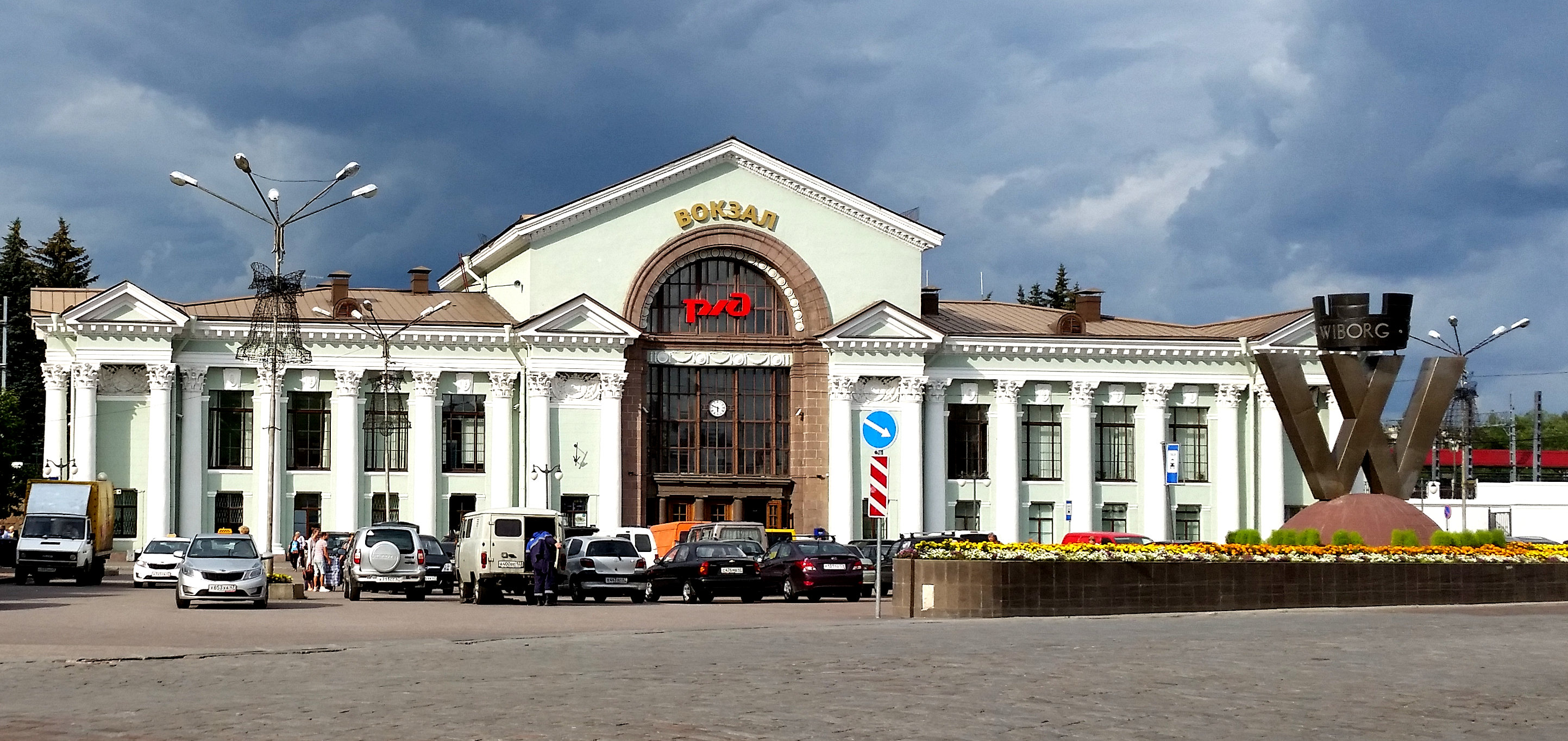 Bahnhof Vyborg / Russland